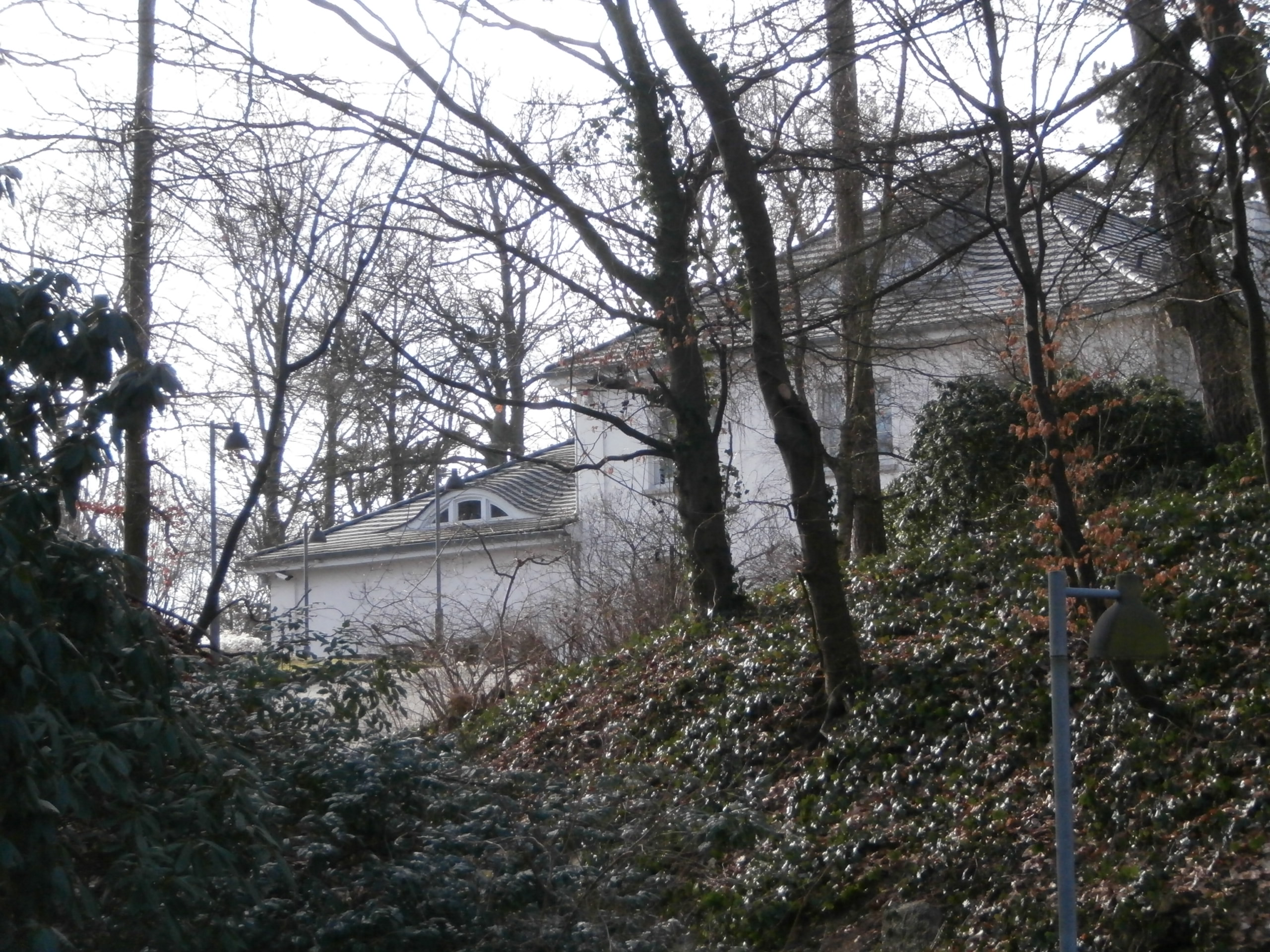 Für Otto Illies 1911 von Walther Baedeker entworfenes Wohn- und Atelierhaus mit gestaltetem Garten als EnsembleThis is a photograph of an architectural monument.